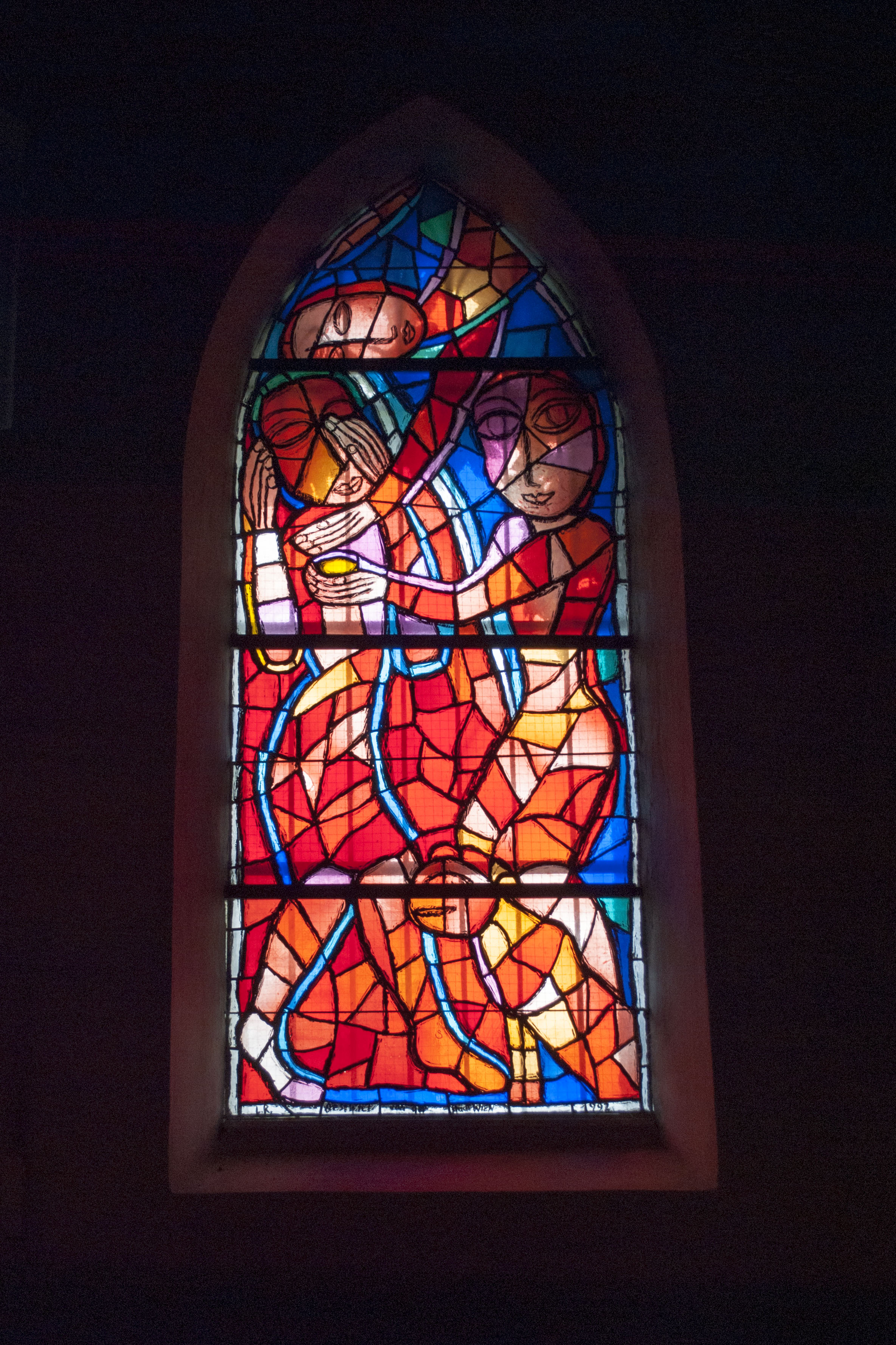 Kirche hl. Ruprecht, Ruprechtskirche